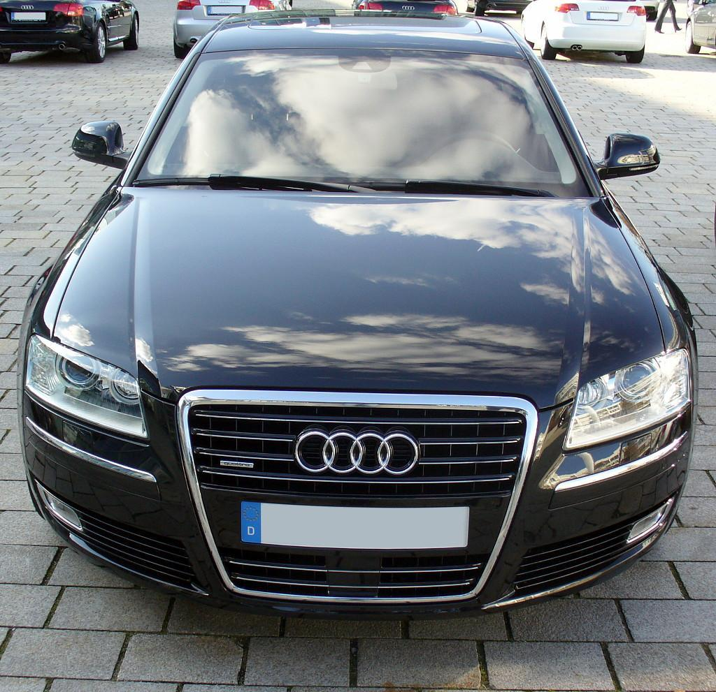 Audi A8